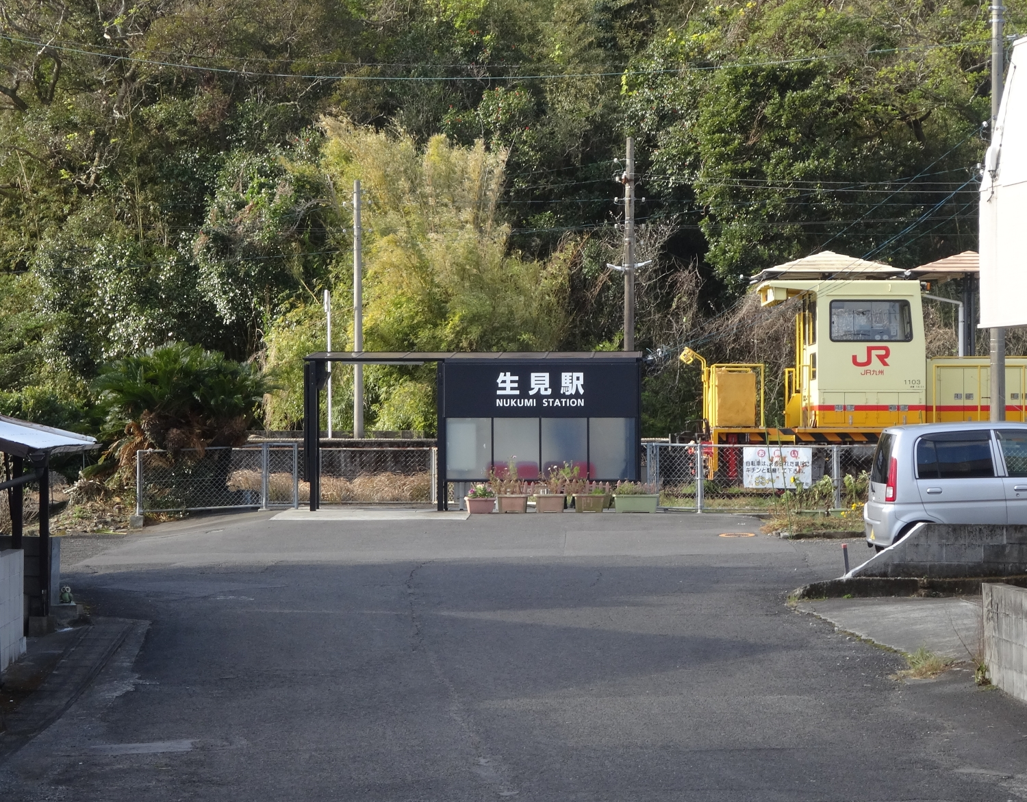 2019年2月1日時点の生見駅の外観